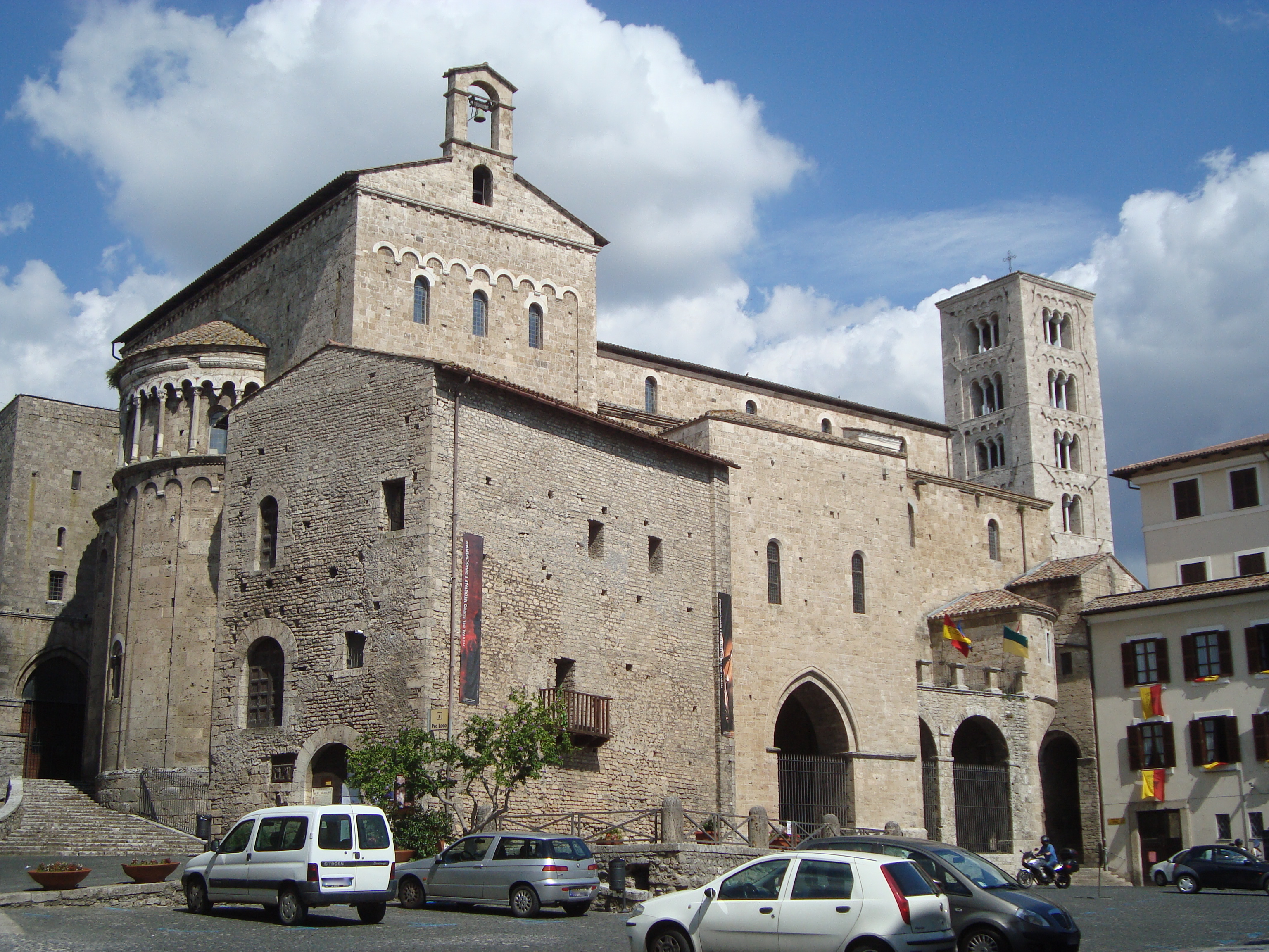 Vue d'ensemble de la cathédrale Santa-Maria d'Anagni